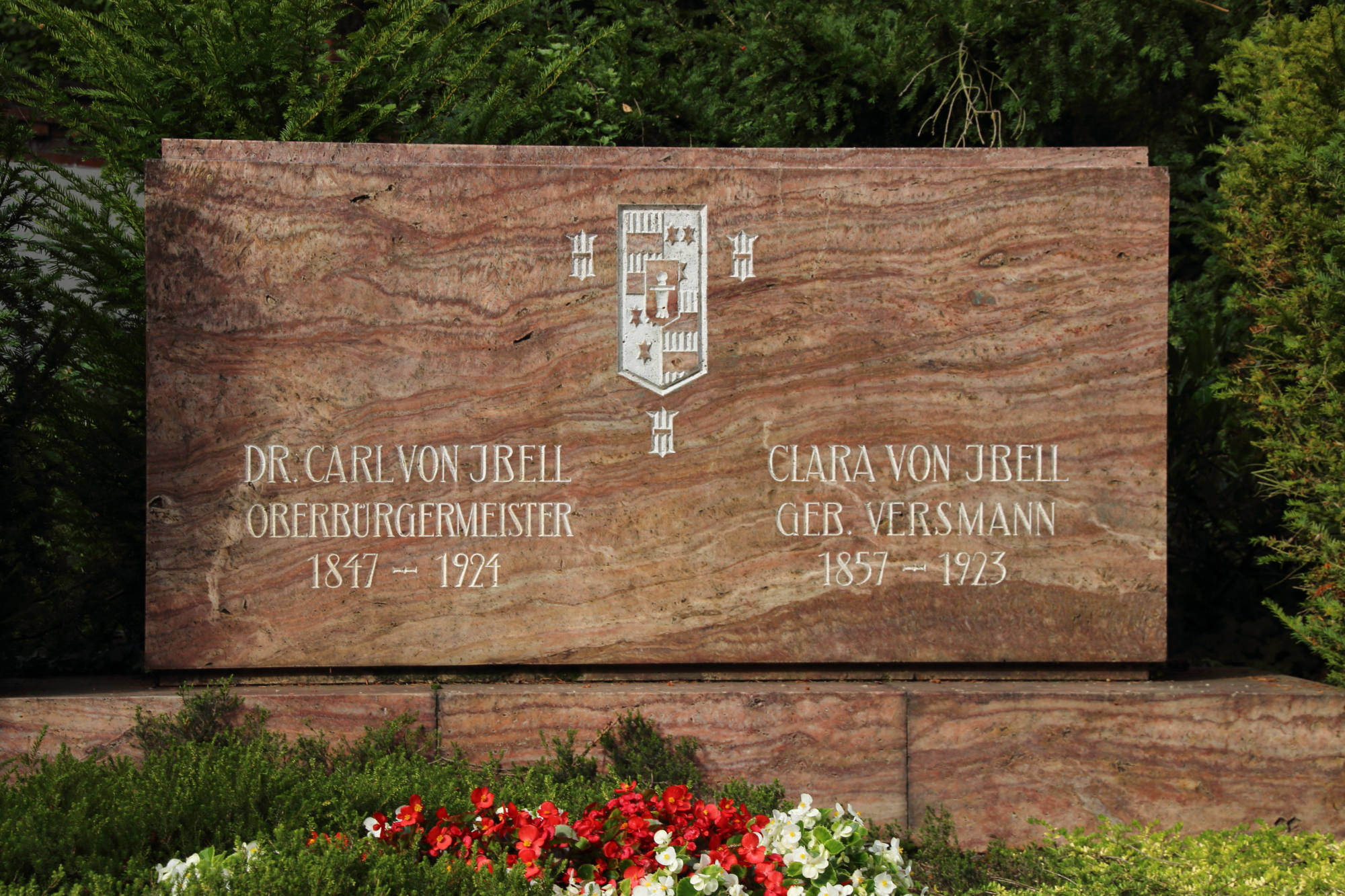 Ehrengrab der Stadt Wiesbaden für Carl Bernhard von Ibell (* 8. Juli 1847 in Ems; † 22. November 1924 in Wiesbaden), 1883 bis 1913 Oberbürgermeister von Wiesbaden.